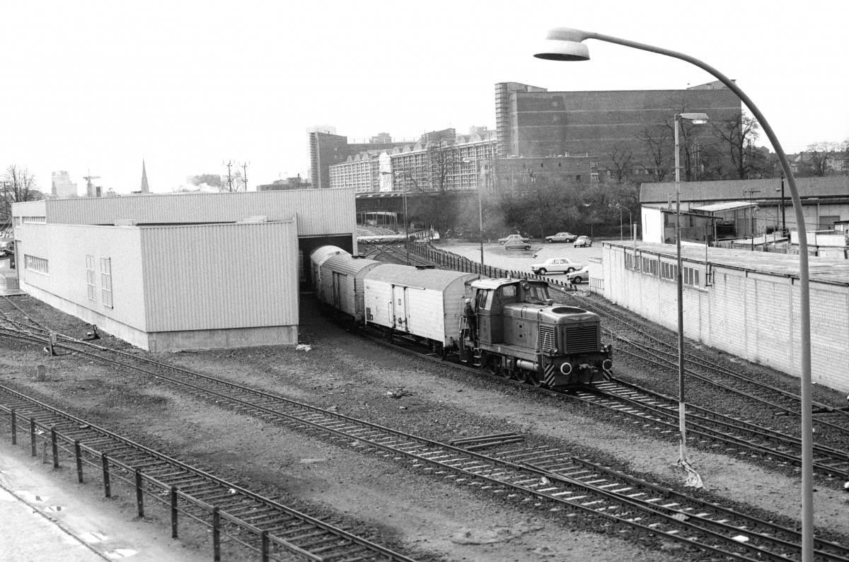 Lok D 6 holt an der Großmarkthalle Bananenwagen ab, 24. März 1983. Im Hintergrund das Gebäude der Großmarkthalle, heute Sitz der Europäischen Zentralbank. Die Aufnahme entstand von der Honselbrücke aus.